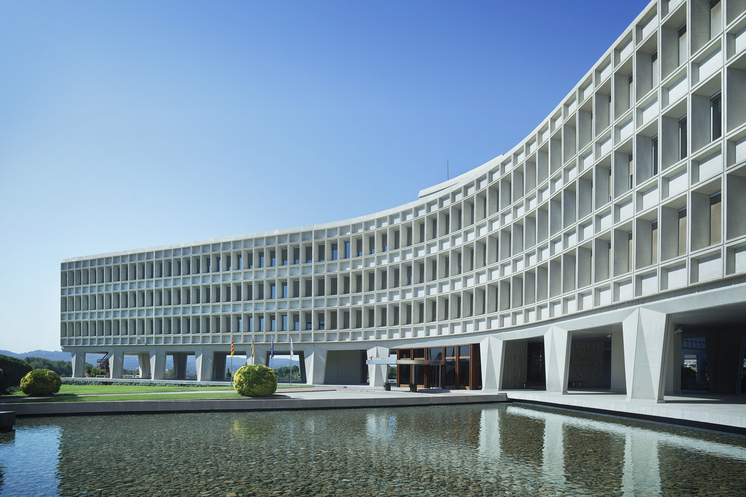 Edificio Central del Grupo Catalana Occidente (Sant Cugat del Vallés)